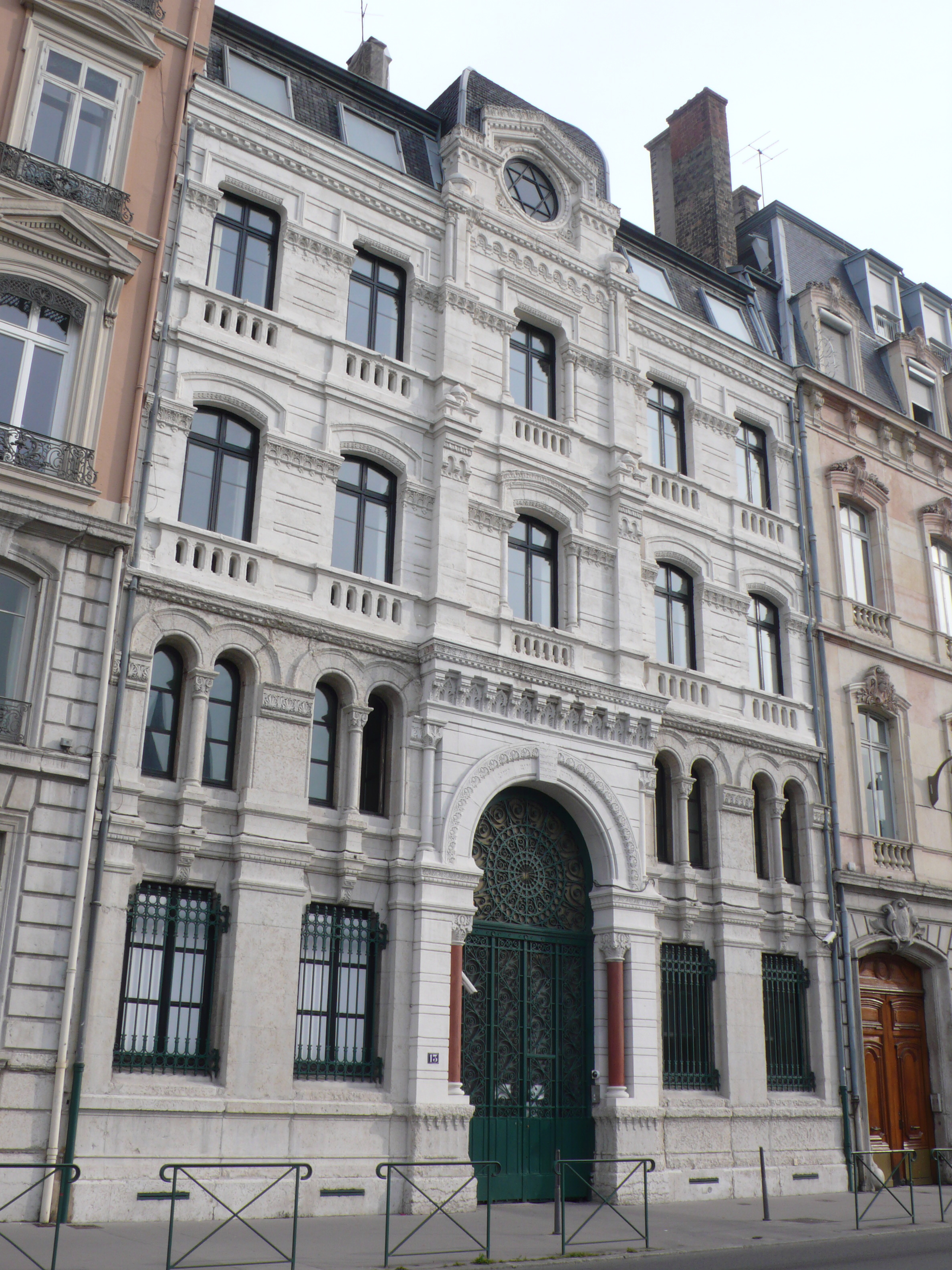 Inaugurée en 1864, fin de la première phase des travaux de rénovation en mai 2010.